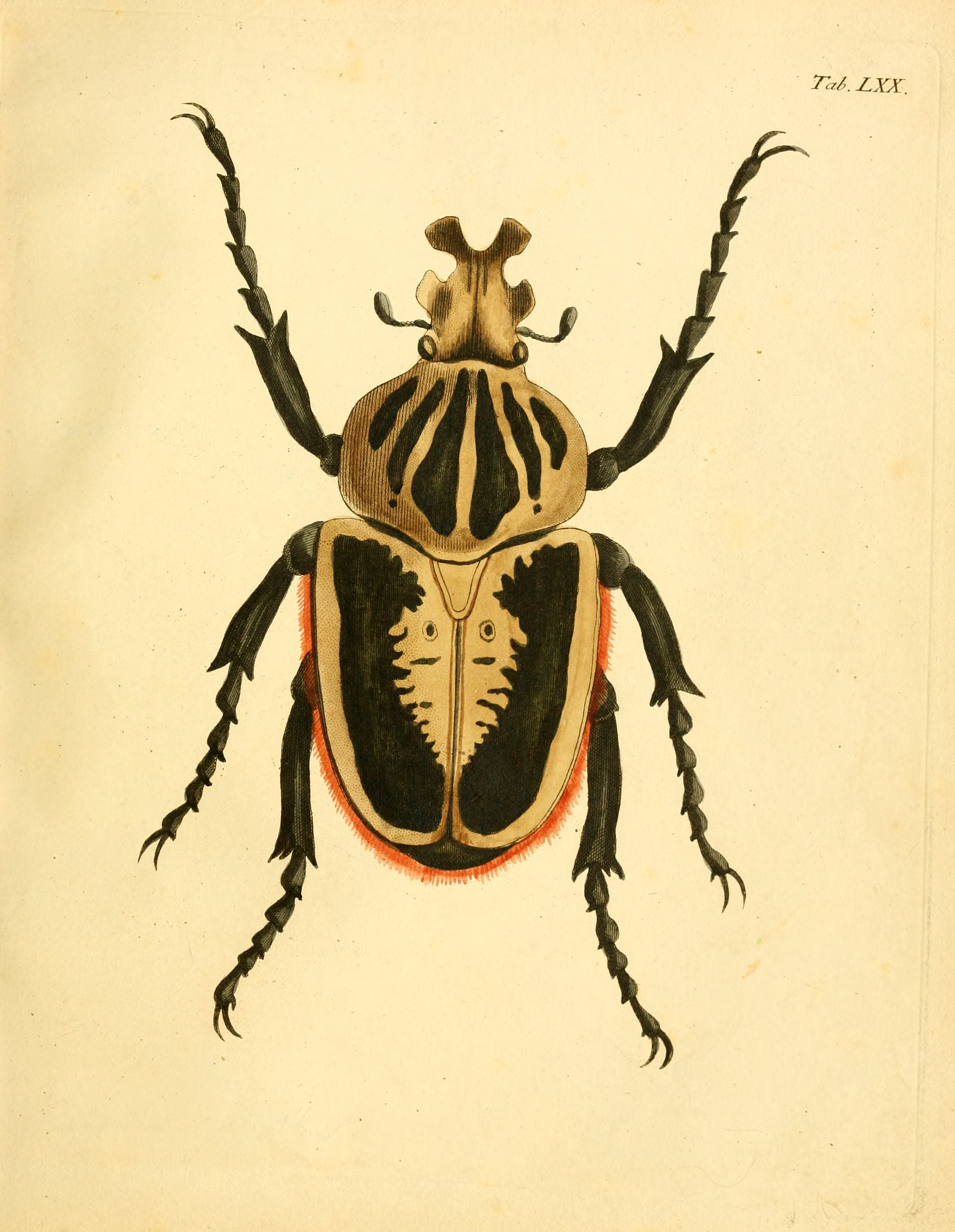 Hand-coloured plate from Abbildungen zu Karl Illiger's Uebersetzung von Olivier's Entomologie.